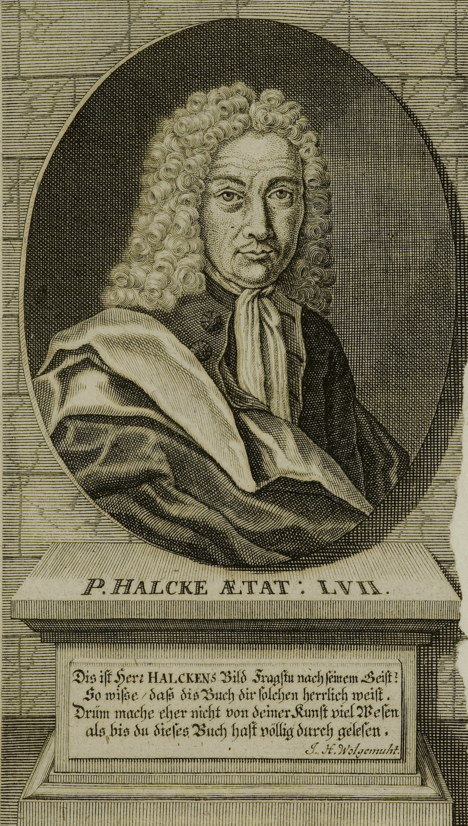 Bildnis von Paul Halcke